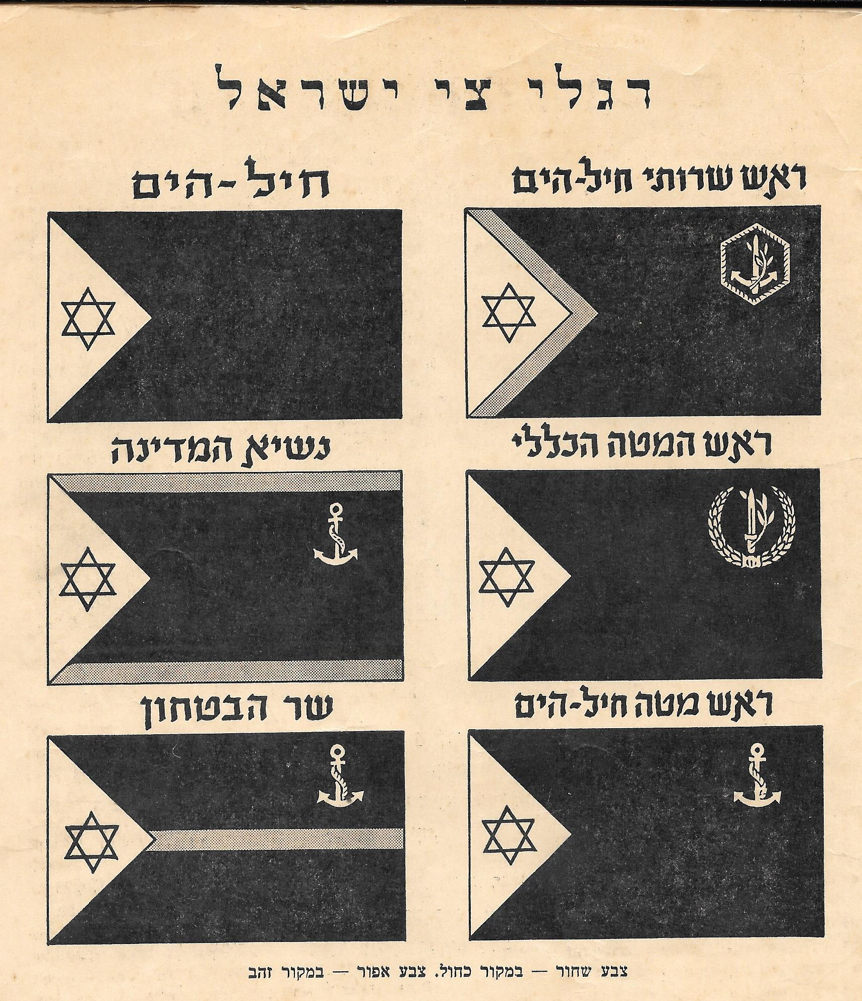 דגלי הכבוד הראשונים של צי ישראל